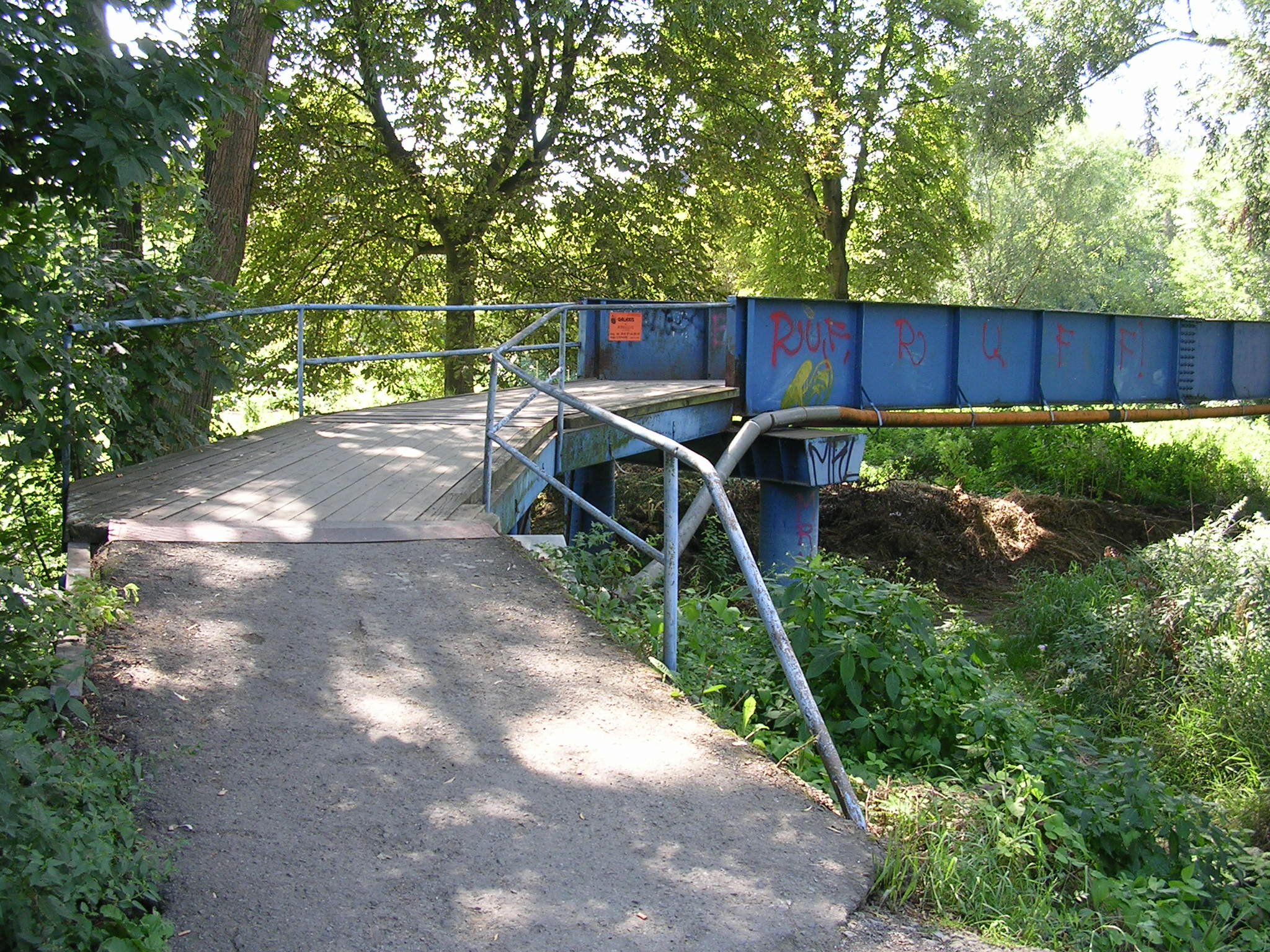 Lávka mezi městem Černošice a Dolními Černošicemi v městské části Praha-Lipence